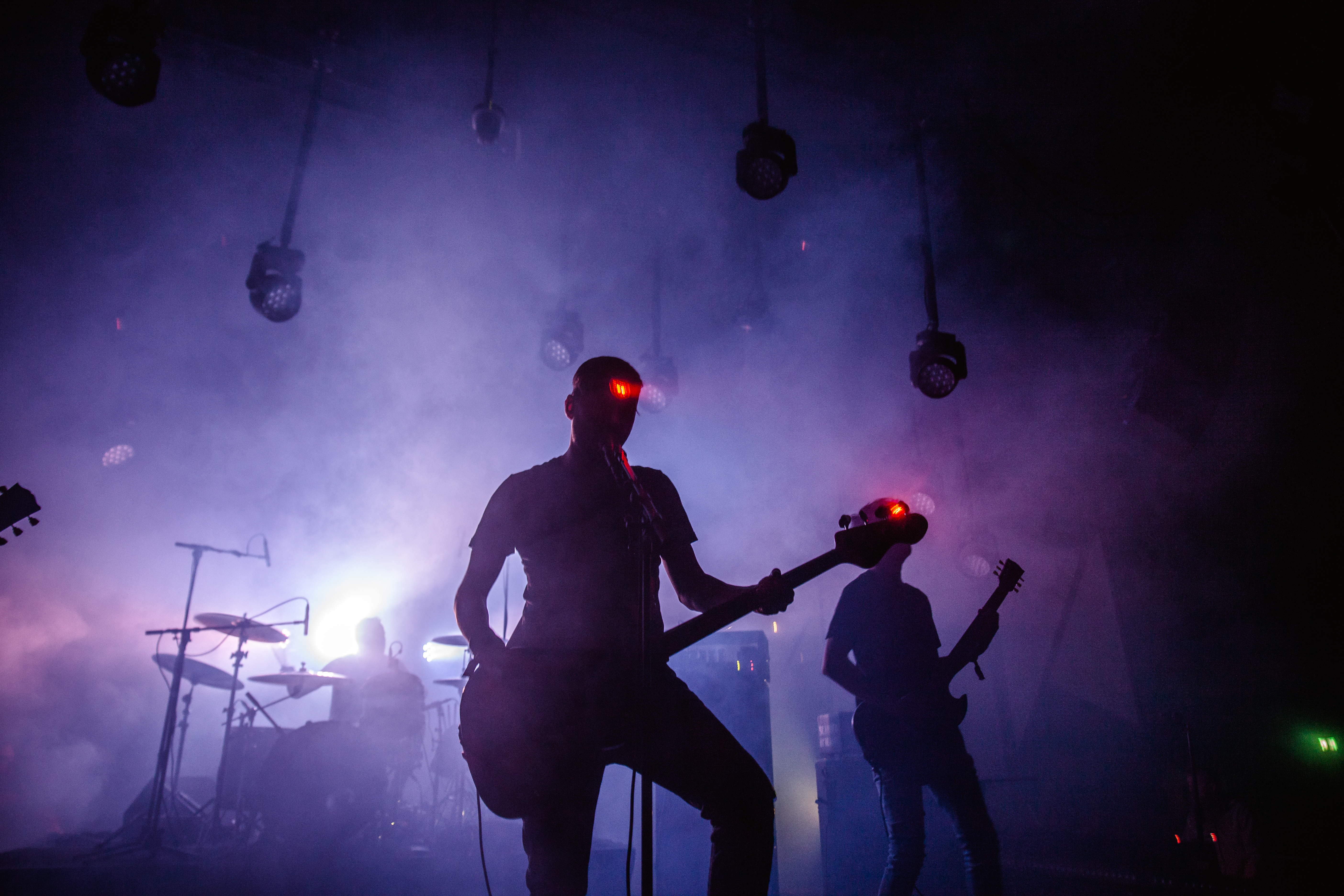 Festivalsommer This photo was created with the support of donations to Wikimedia Deutschland in the context of the CPB project "Festival Summer".